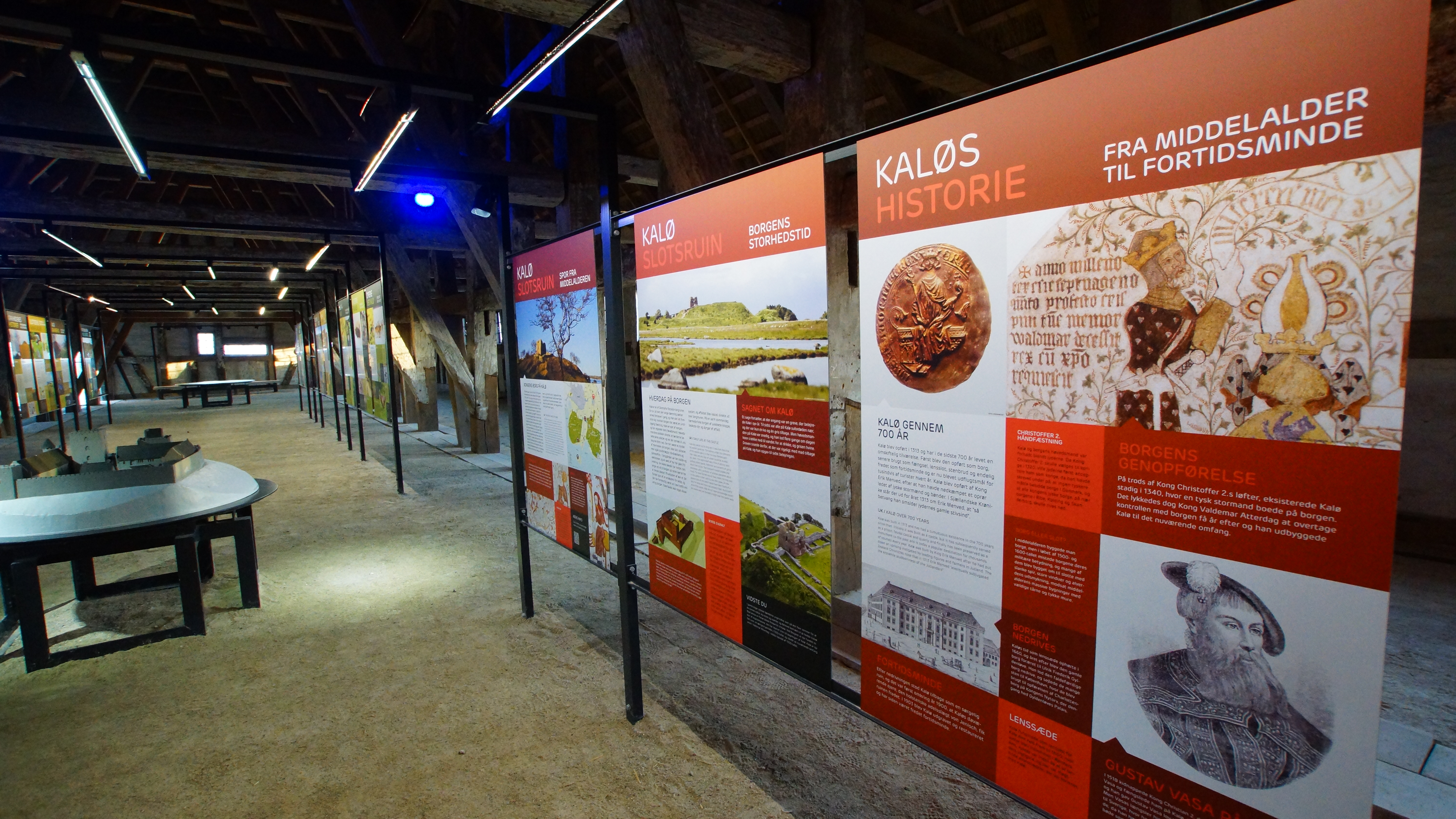 Karlsladen, plancher